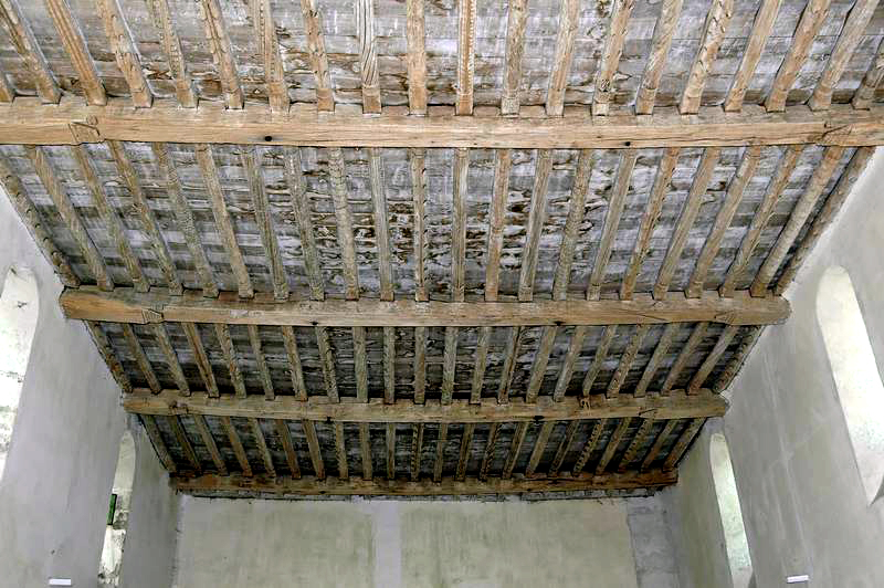 Plafond de l'église de Viffort, dans le sud de l'Aisne.